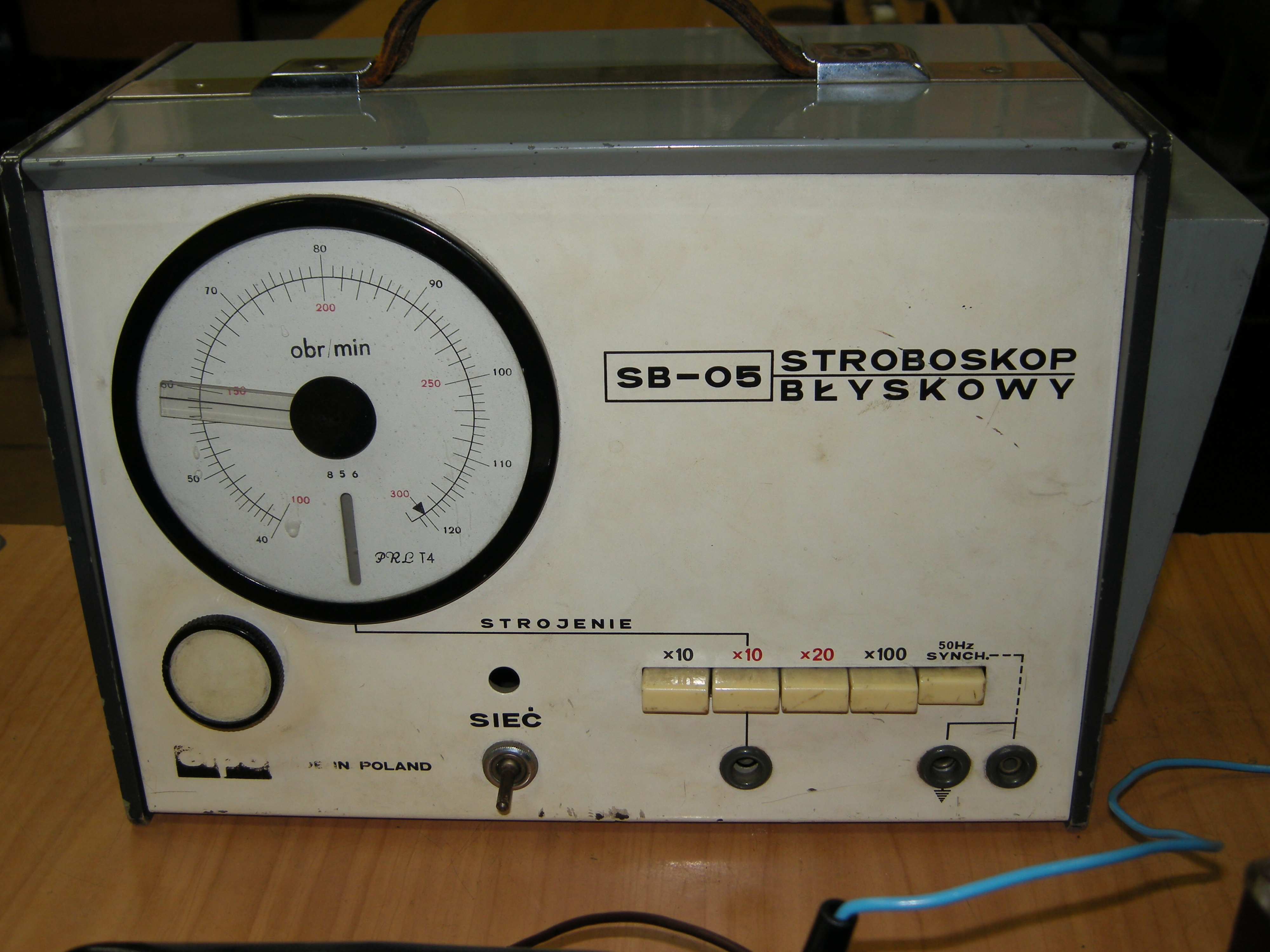 Stroboskop błyskowy. Politechnika Poznańska.